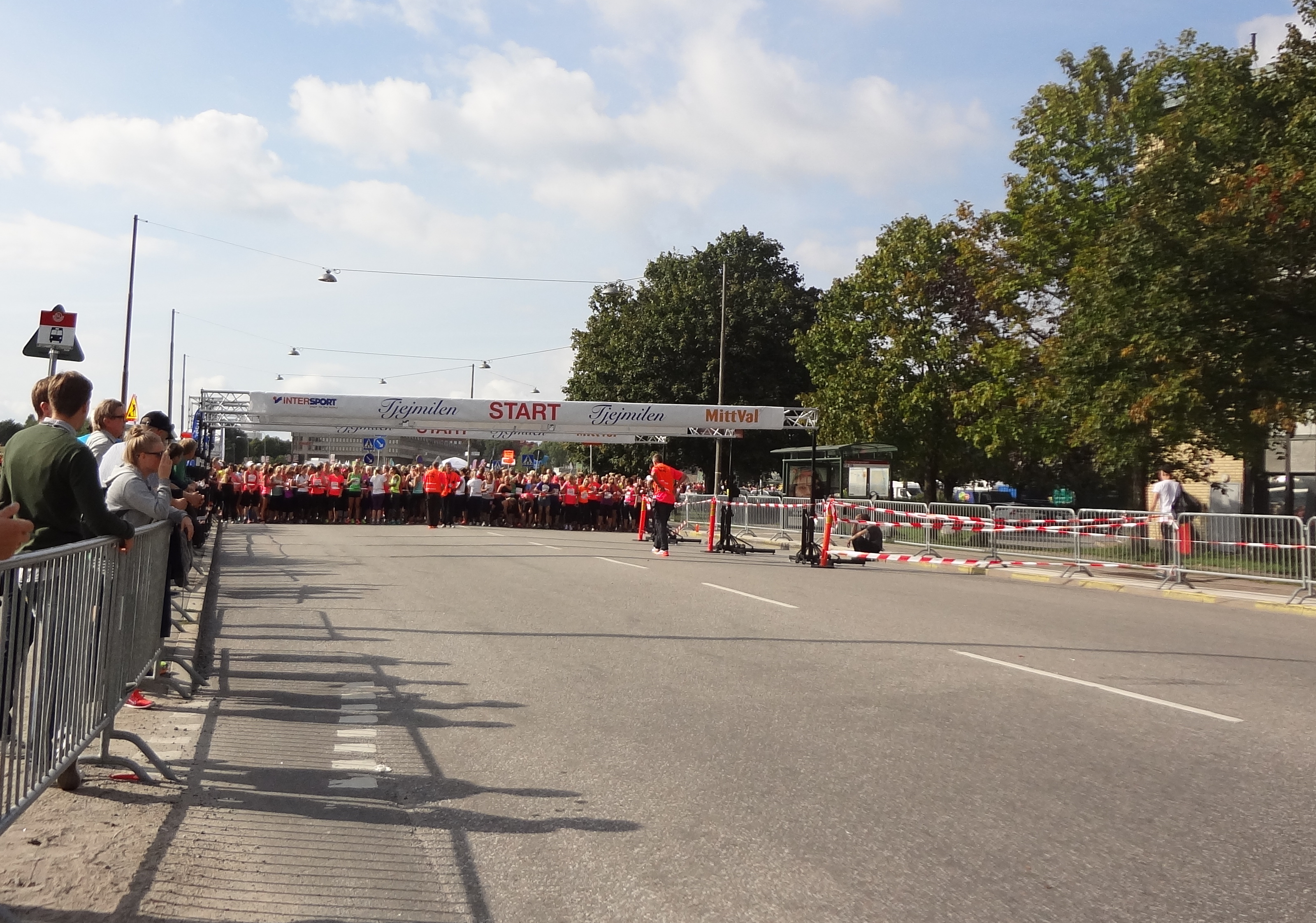 Tjejemilen 2014, vid startlinjen, startgrupp 7.